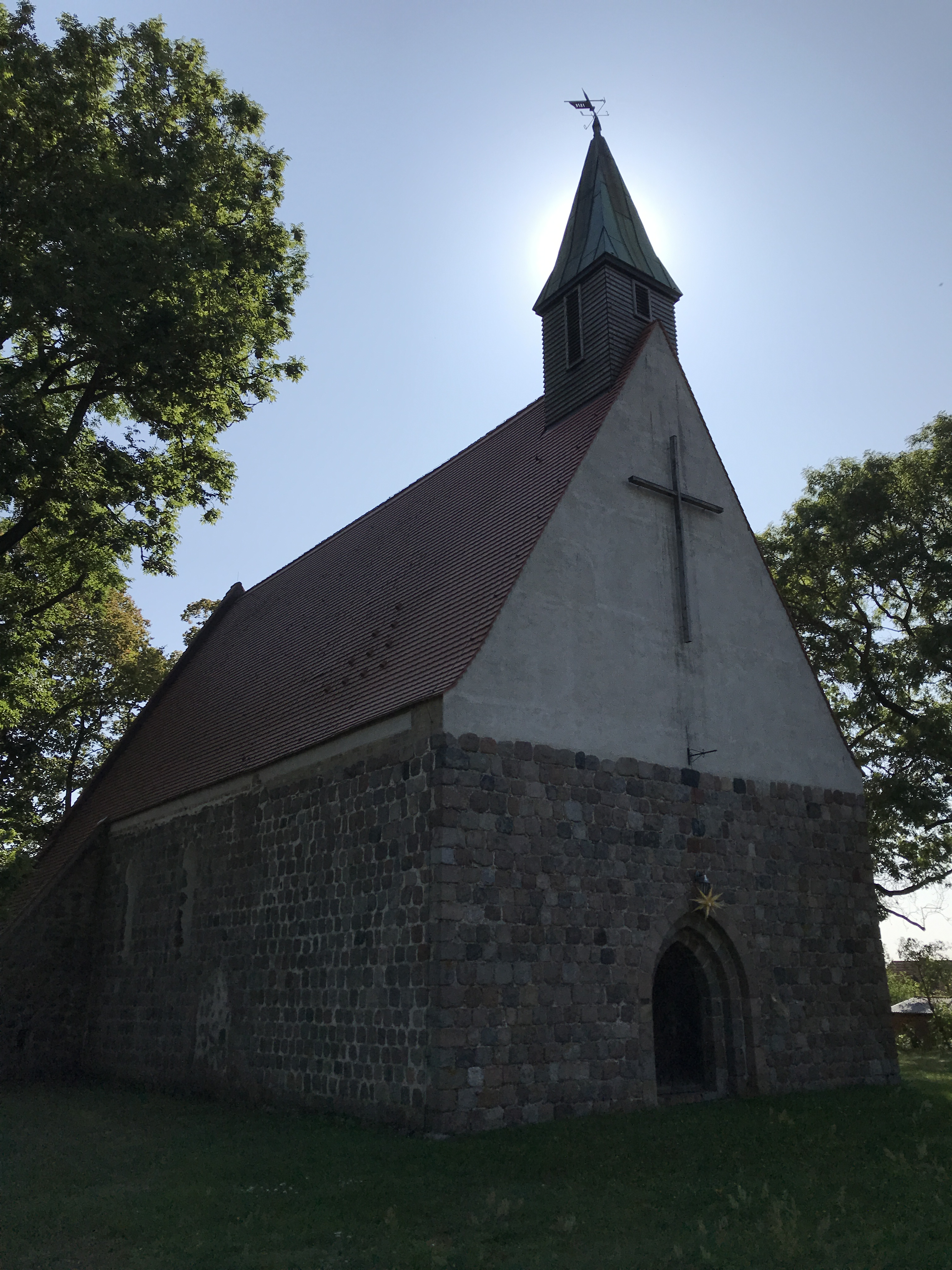 Die Kirche Dargitz ist eine Feldsteinkirche aus der zweiten Hälfte des 13. Jahrhunderts in Schönwalde im Landkreis Vorpommern-Greifswald im Land Mecklenburg-Vorpommern. Im Innern steht unter anderem ein Altaraufsatz aus dem Anfang des 18. Jahrhunderts.